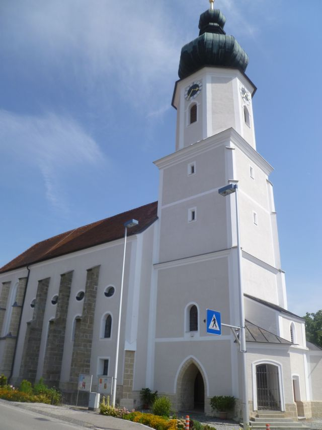 Kath. Pfarrkirche Mariä Himmelfahrt